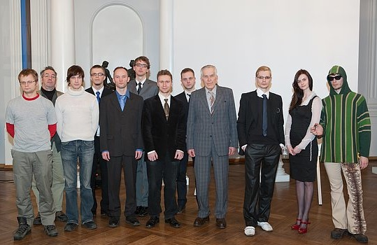 Rahvusvaheline konverents, teaduslik konverents 2009. Grupipilt.